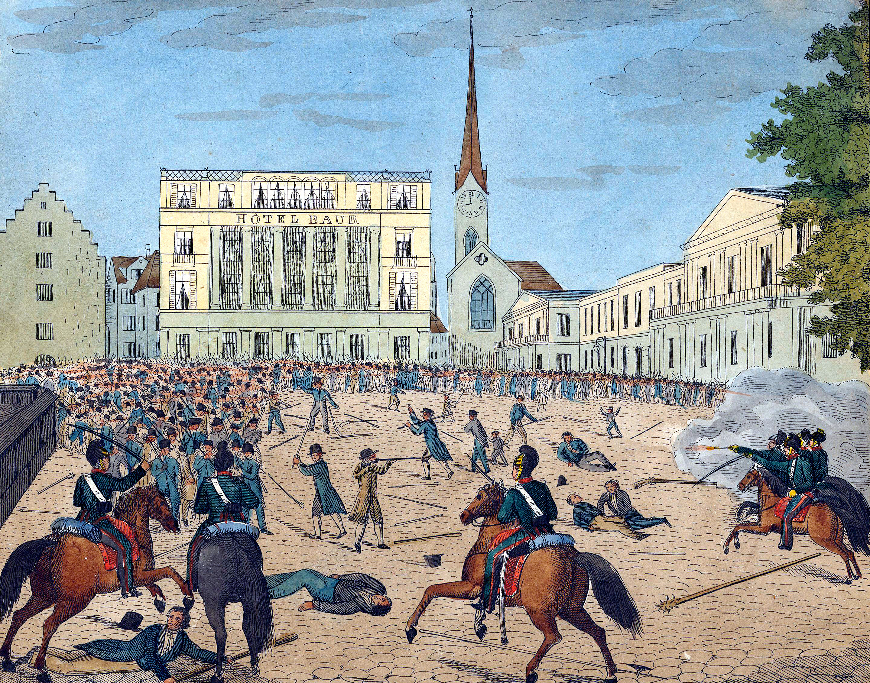 Kämpfe auf dem Paradeplatz zwischen Regierungstruppen und aufständischem Landvolk während des Züriputschs 1839.